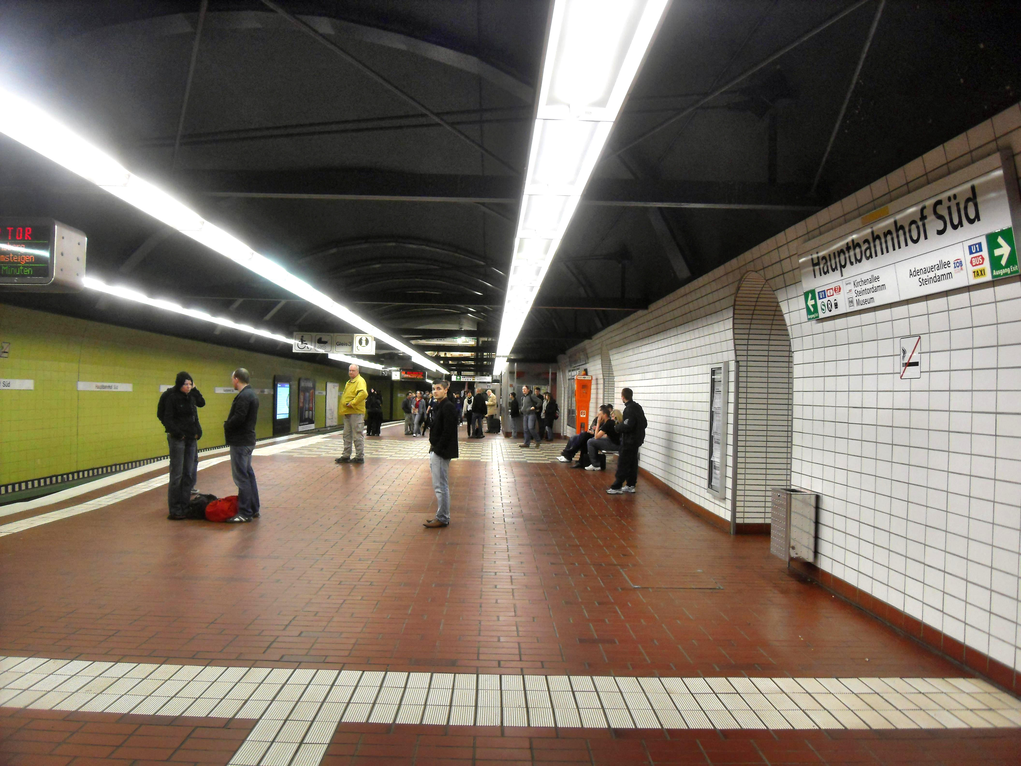 Der Hamburger U-Bahn-Bahnhof Hauptbahnhof Süd auf dem Bahnsteig Richtung Mümmelmannsberg in Deutschland